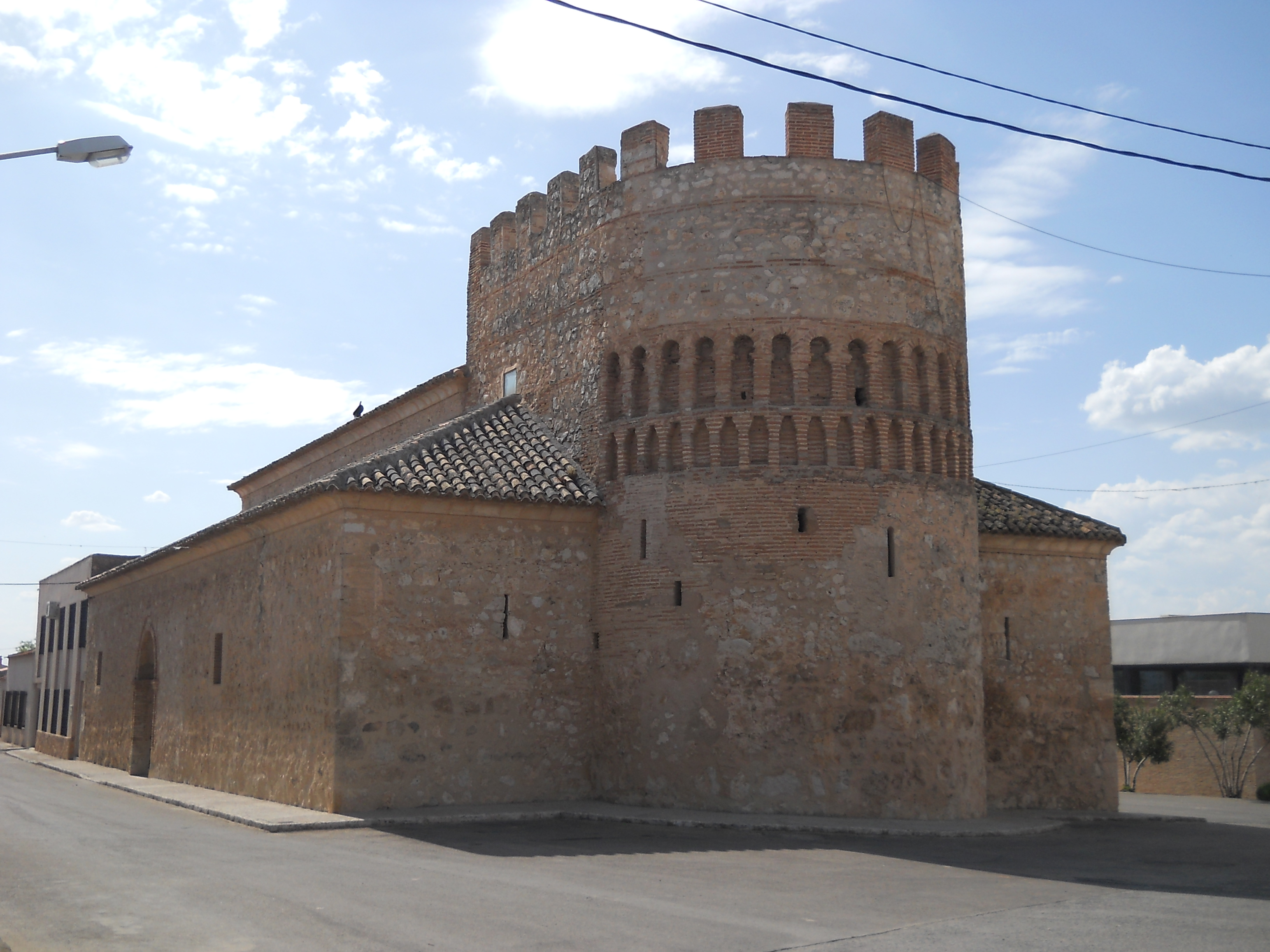 Iglesia de Santa María de las Angustias, Arenas de San Juan, Ciudad Real, España